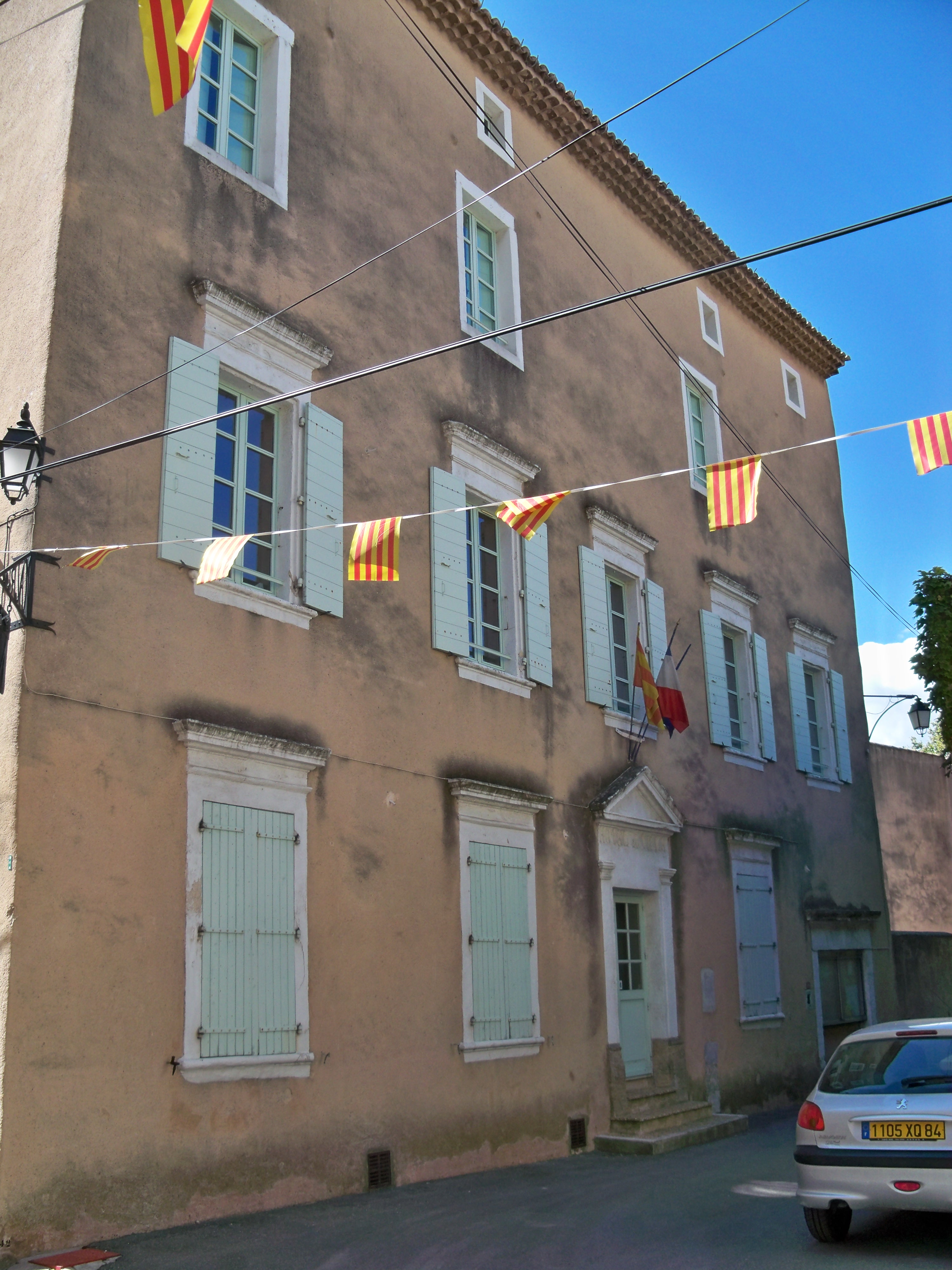 Mairie de Mornas, Vaucluse, France